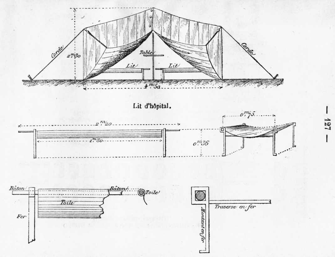 imagenes del libro Recuerdos de una Misión en el Ejército Chileno del oficial francés Eugène Marie Le Léon 1